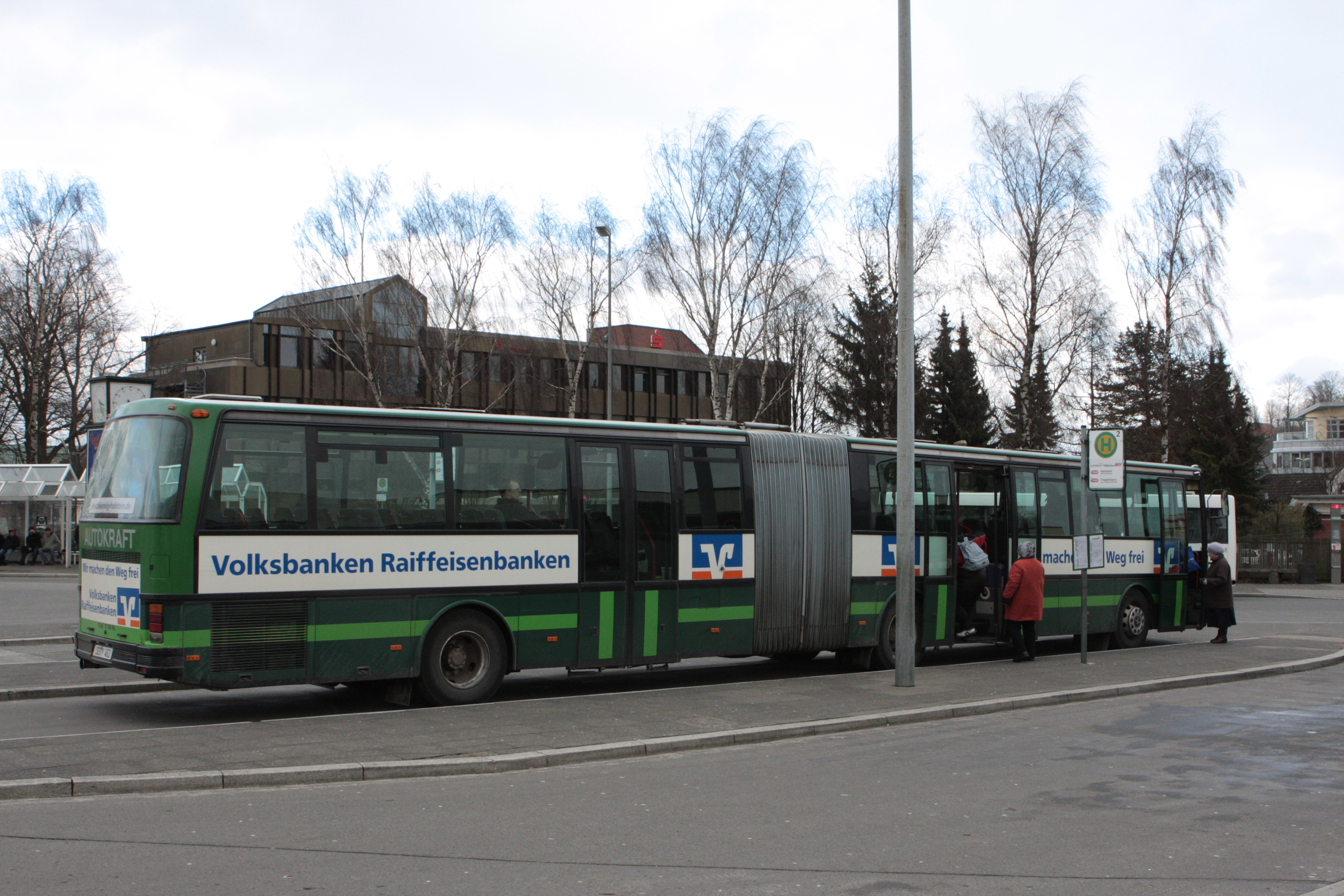 Autokraft-Bus in Bad Segeberg